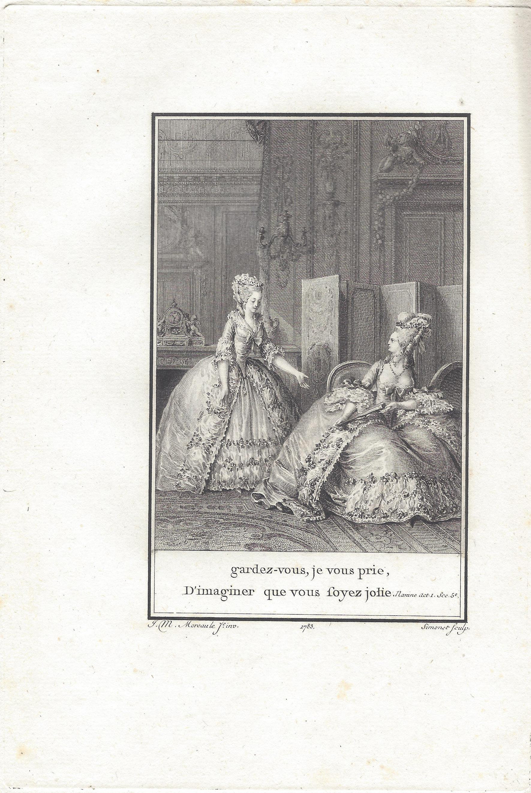 Voltaire: Nanine Akt 1 Szene 3 Kupferstich von Jean-Baptiste Simonet nach Jean-Michel Moreau